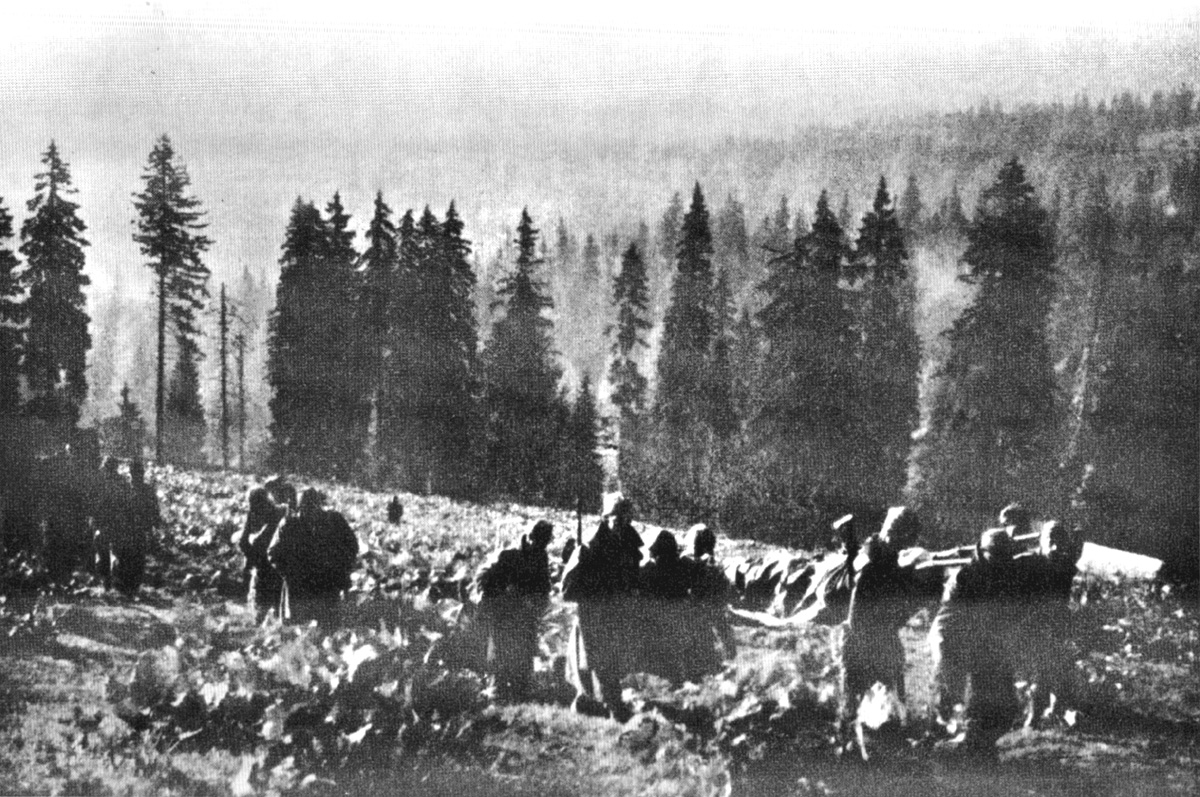 Srpskohrvatski / српскохрватски: Partizani u neprohodnim šumama istočne Bosne, nakon proboja na Sutjesci 1943.